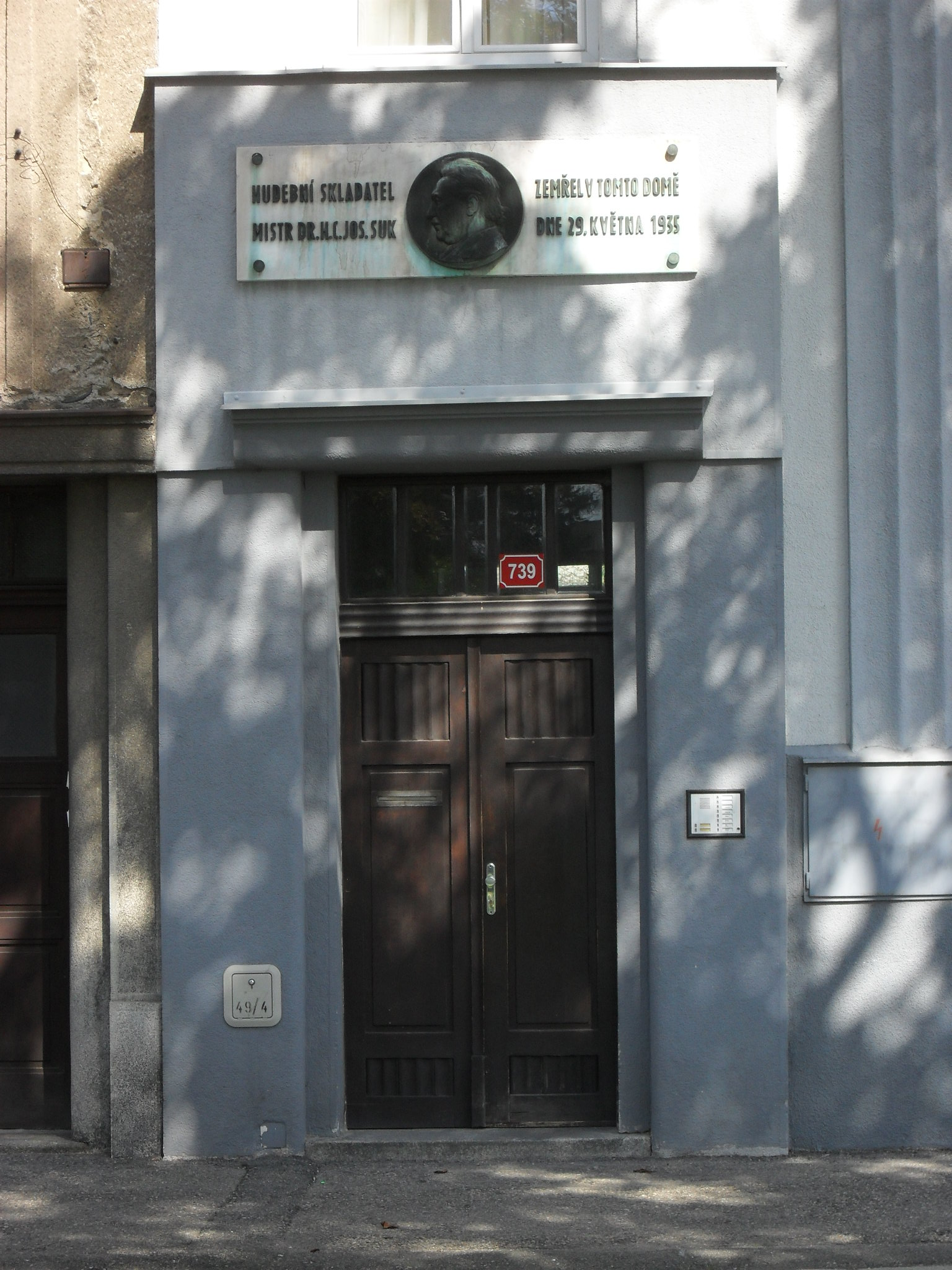 Dům, kde zbytek života trávil a také zde zemřel hudební skladatel Josef Suk